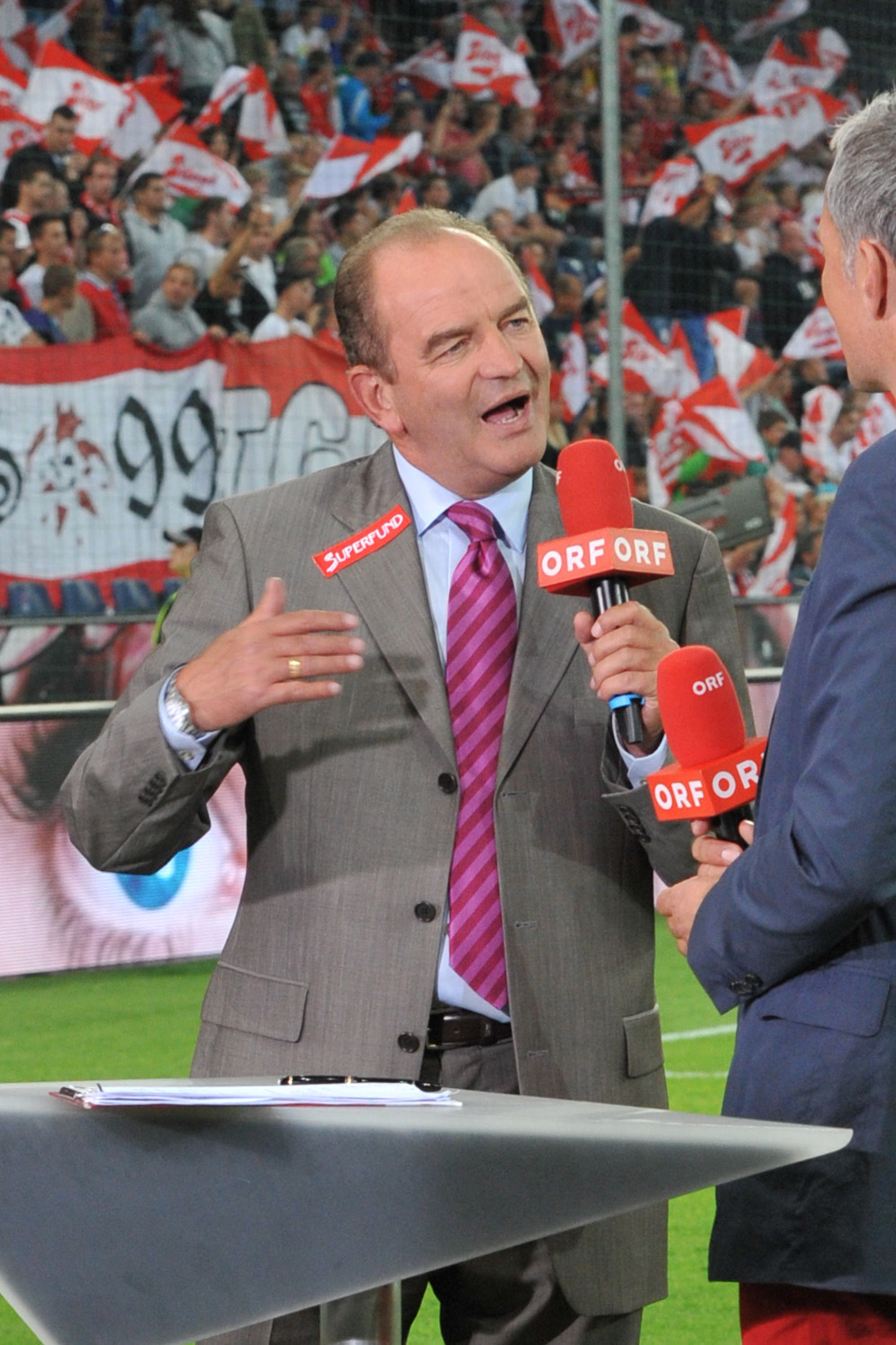 Freundschaftliches Länderspiel Österreich - Griechenland am 14. August 2013 in Salzburg: Herbert Prohaska